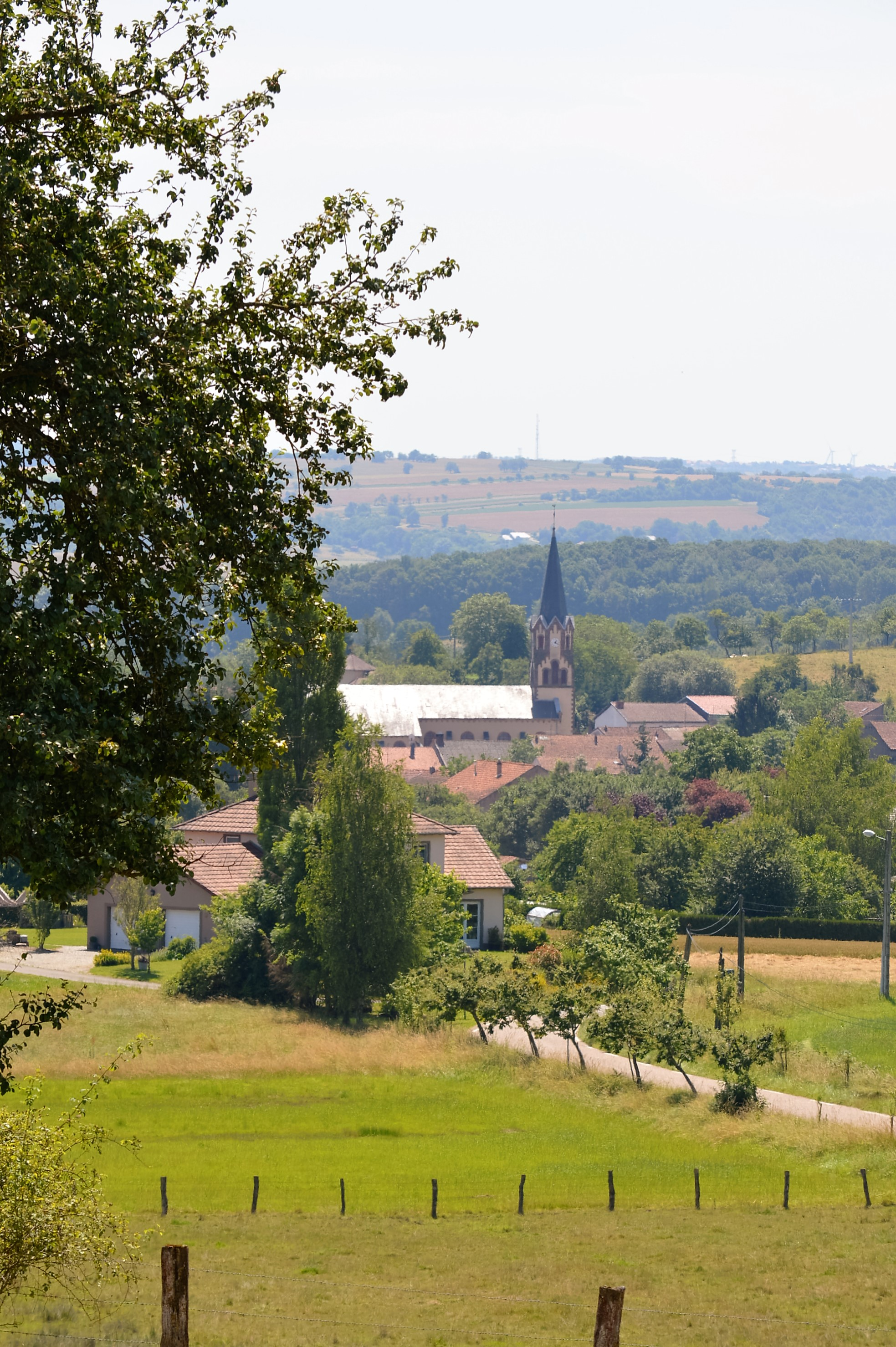 Vue générale du village